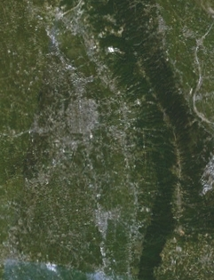 員林鎮衛星圖。